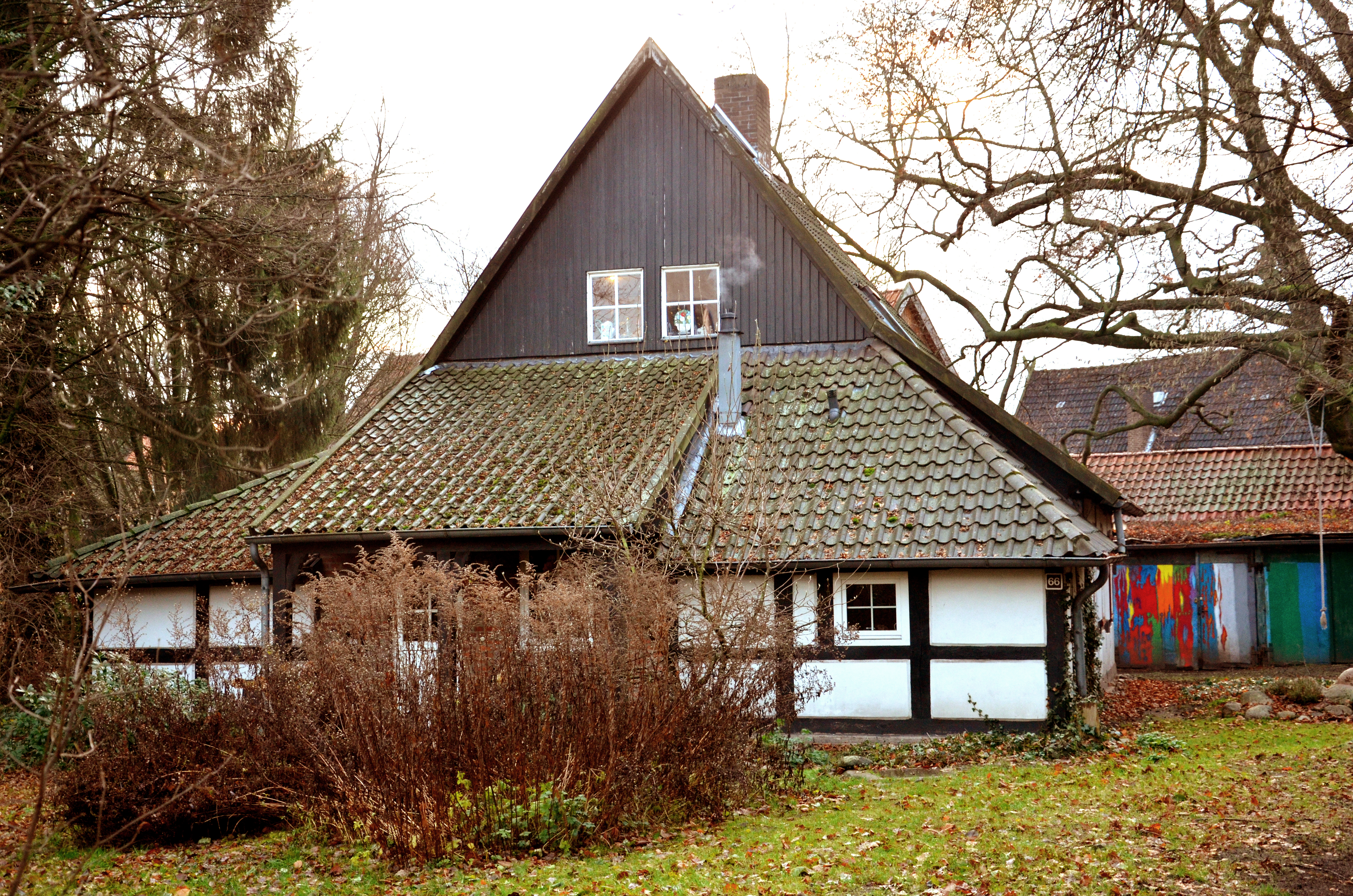 Das im 18. Jahrhundert erbaute, später von der Familie des kroatischen Bildhauers, Malers, Illustrators und Comic-Zeichners Vladimir Magdić unter den Auflagen des Denkmalschutzes restaurierte Fachwerkhaus am Groß-Buchholzer Kirchweg 66 in Hannover. Im Bild rechts ist die mehr als 200 Jahre alte und 1986 zum Naturdenkmal erklärte Rotbuche zu sehen.